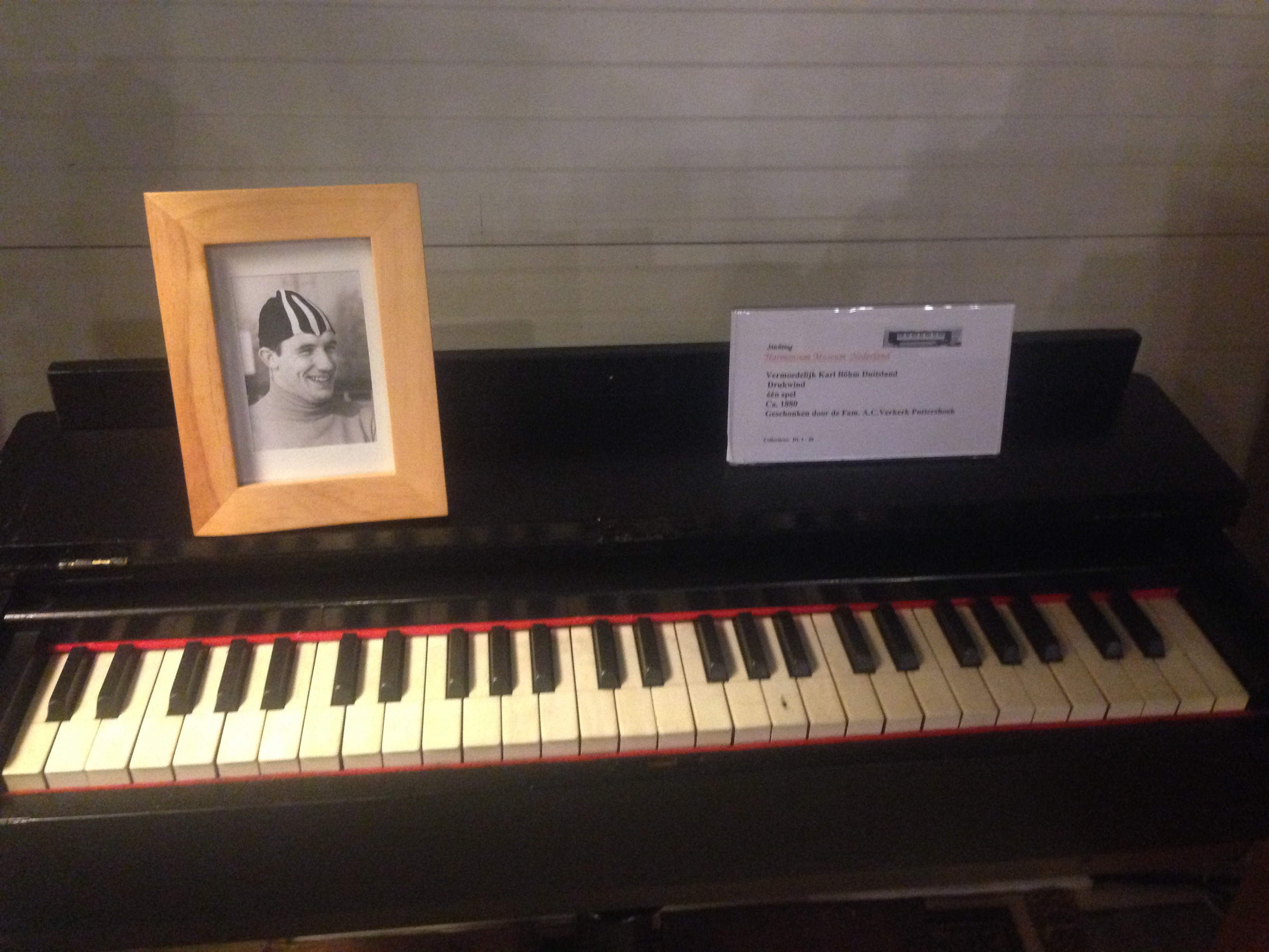 Harmonium Museum Nederland, Veenpark, Barger-Compascuum, Netherlands